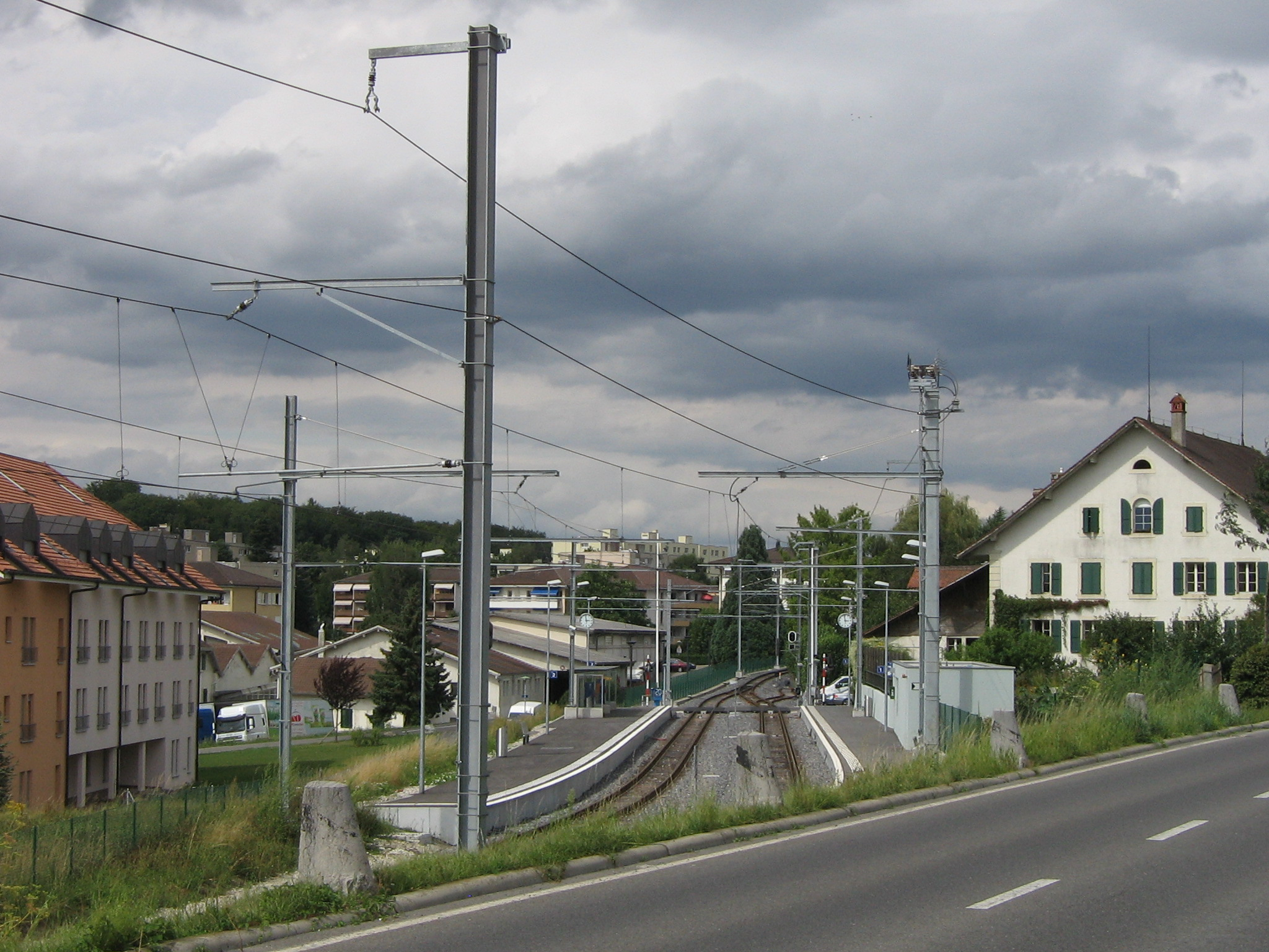 Vue globale de la gare de Romanel en direction d'Échallens